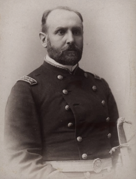 José Miguel Alcérreca Saldes (Santiago 7 de mayo de 1845- Placilla, cerca de Valparaíso, 28 de agosto de 1891). Militar chileno. Participo en la Guerra del Pacífico y en la Guerra Civil de 1891.